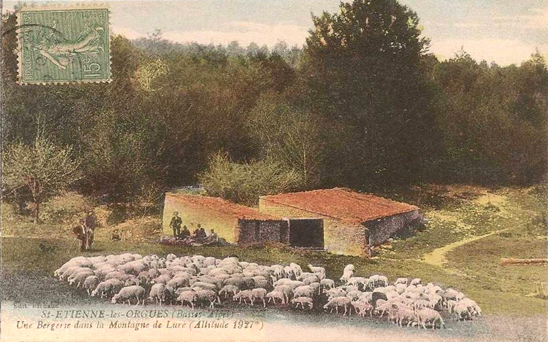 Jas dans la montagne de Lure au début du XXe siècle